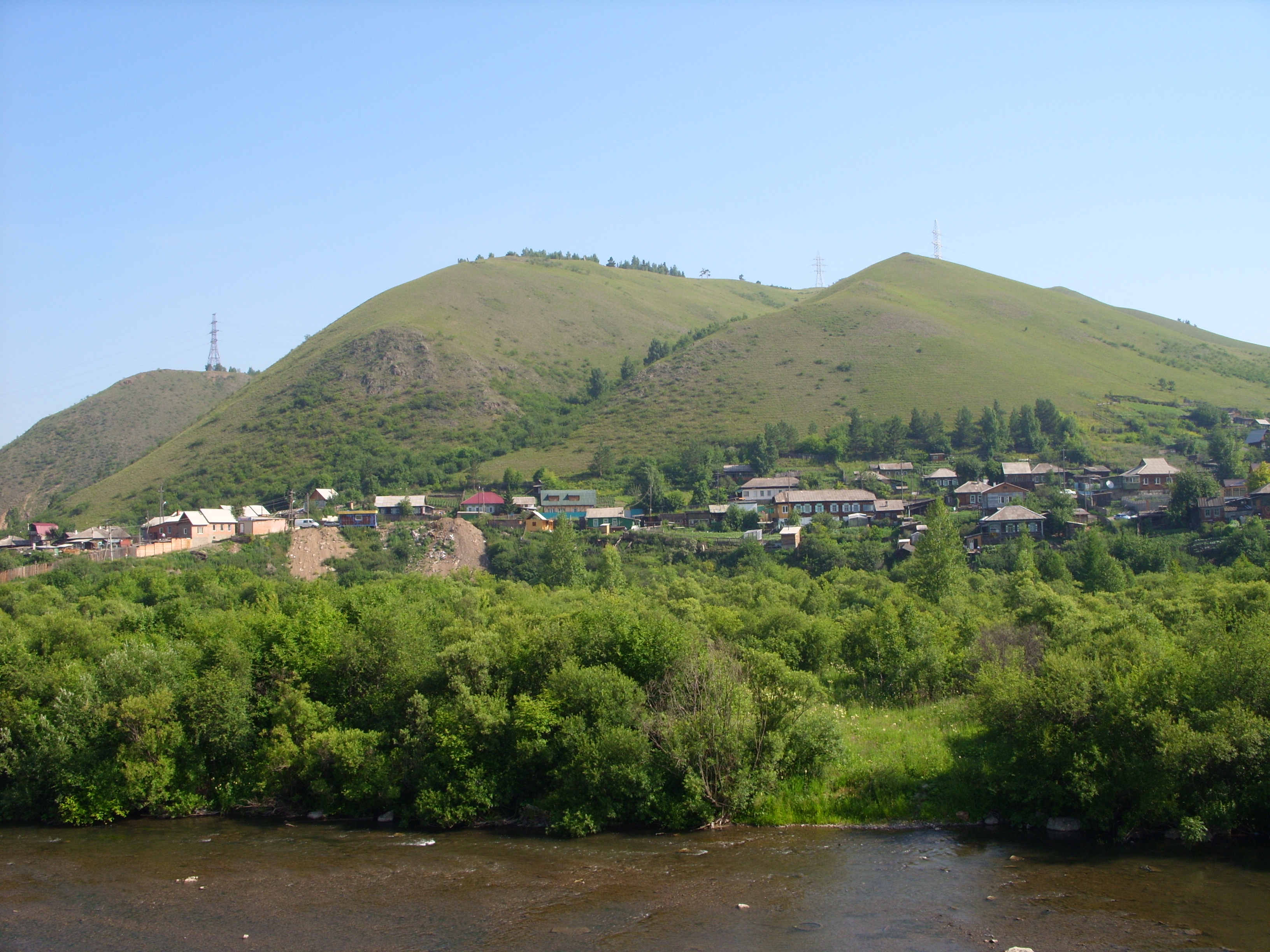 Знаменитый на всю зауральскую Россию горнолыжный комплекс и "фанпарк". Имеет известность на всю Россию, а также за рубежом. Несмотря на это, некоторые неумные представители рода админов Википедии удалили статью про него в русской Википедии, мотивировав "отсутствием энциклопедической значимости" (???)